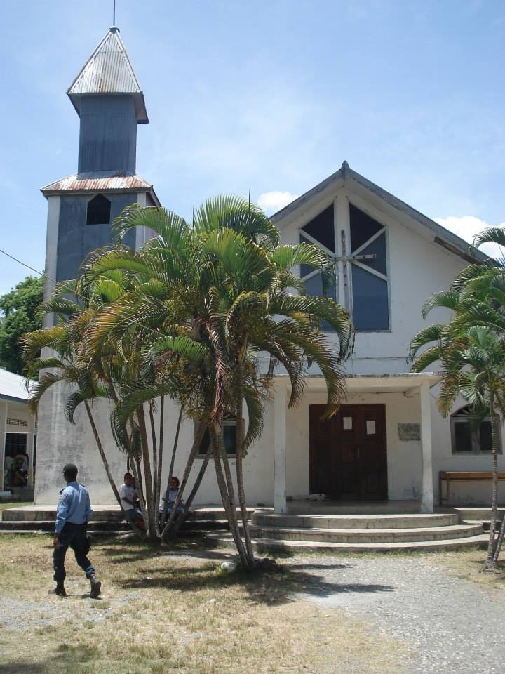 Fatuberlio, Manufahi